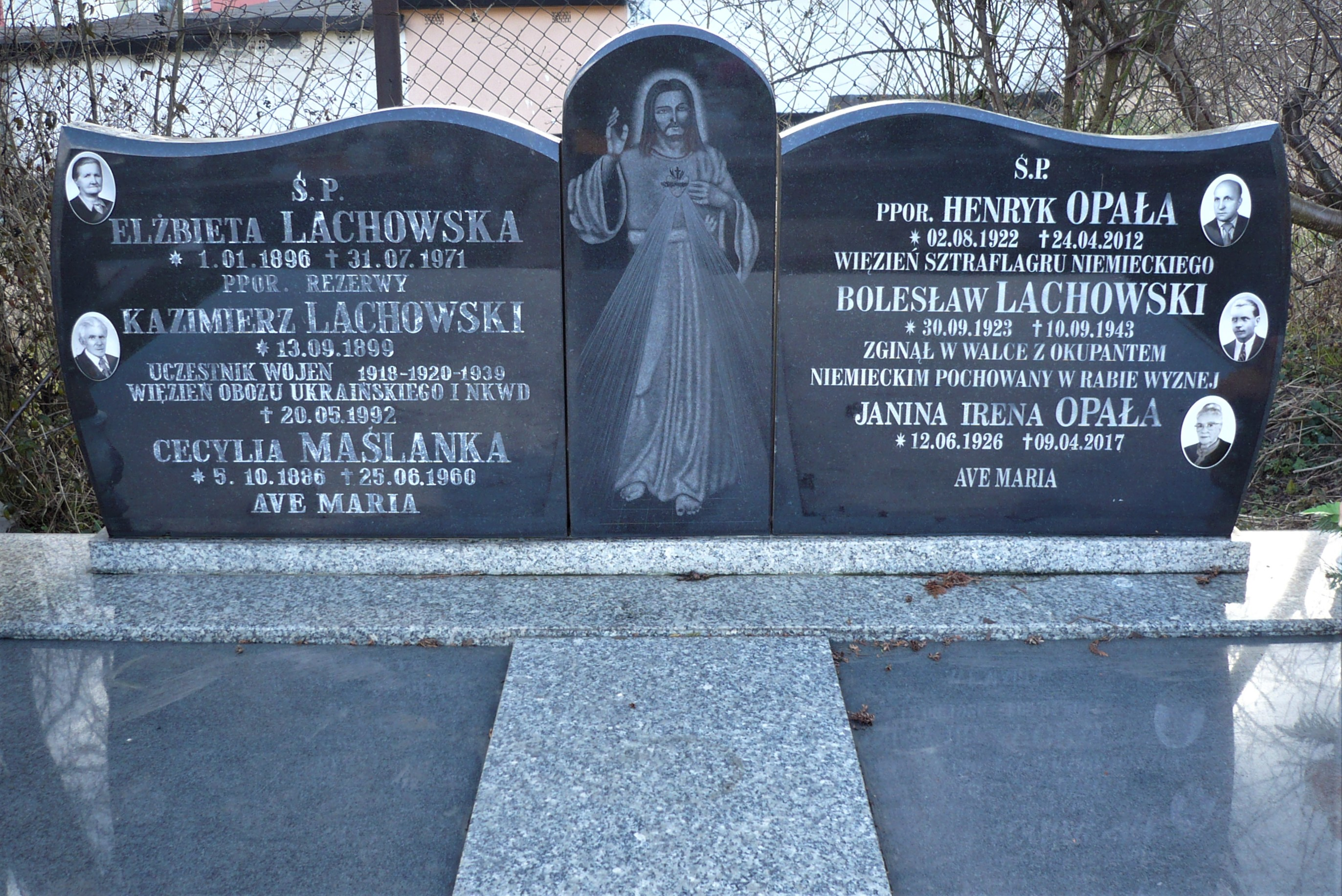 Cmentarz w Nowej Rudzie